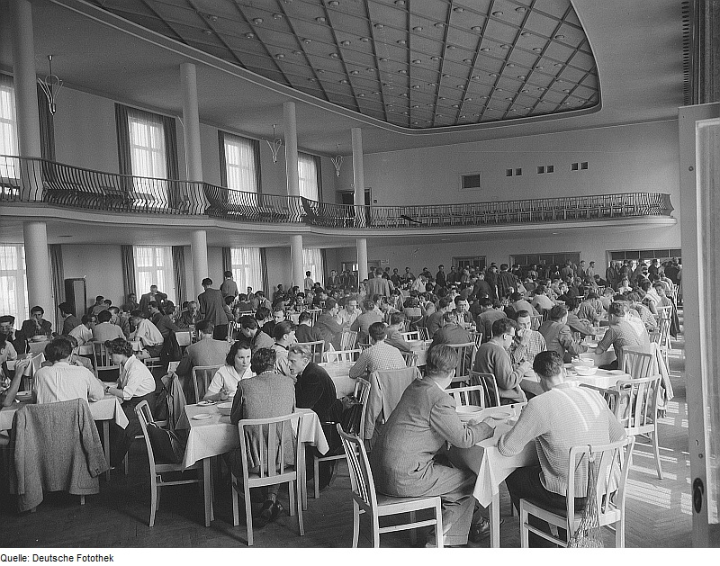 Original image description from the Deutsche Fotothek Dresden. Technische Universität, Alte Mensa, Speisesaal